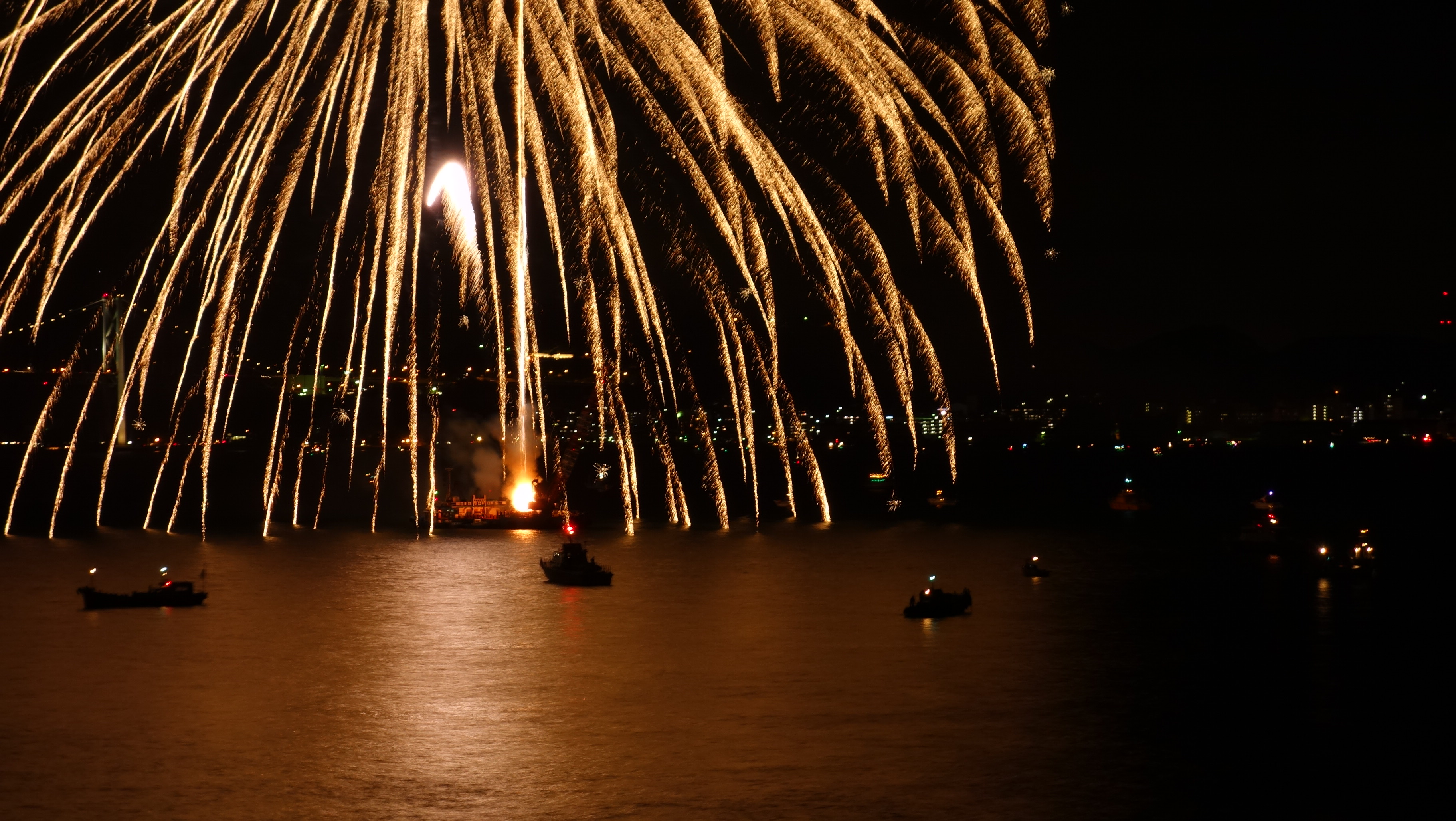 関門海峡花火大会にて台船の上から打ち上げられる花火